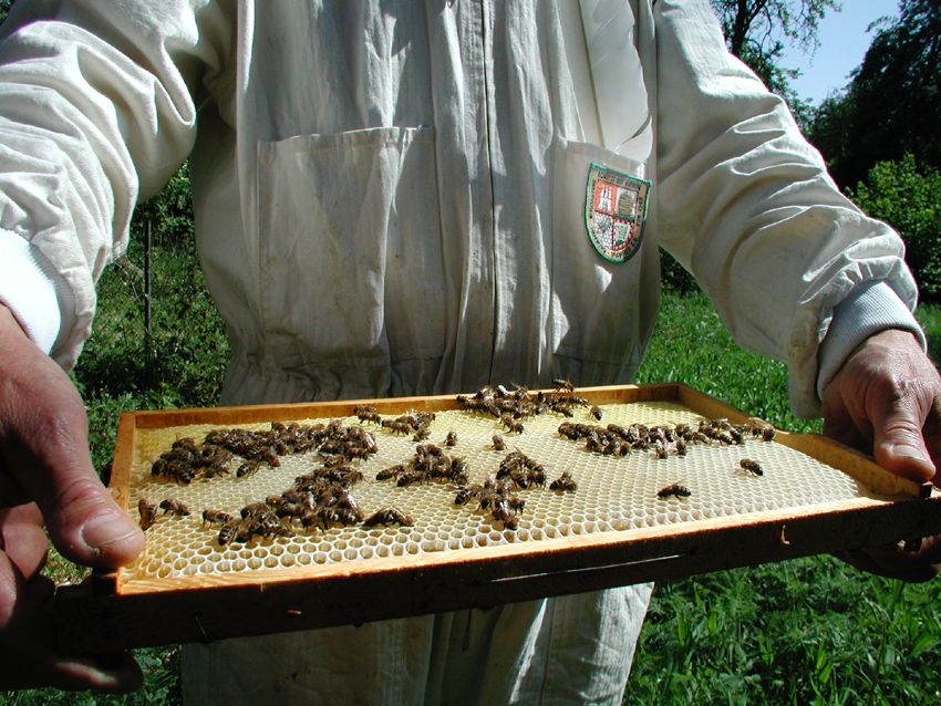 beekeeping (Imker) in Hamburg, Germany